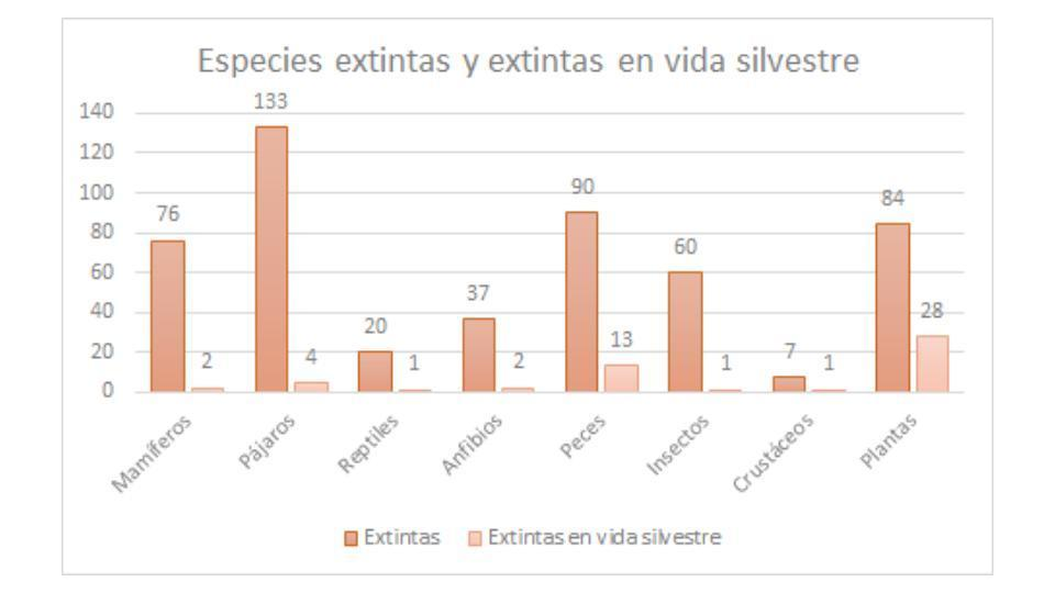 Especies extintas y especies extintas en vida silvestre